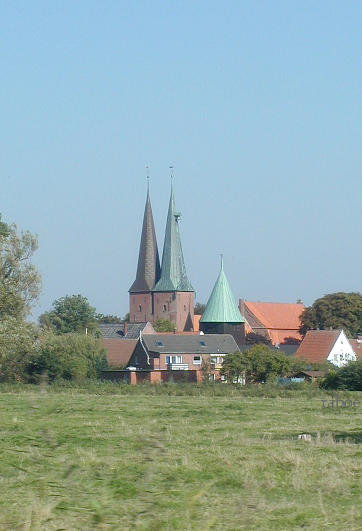 Die Kirchetürme von Altenbruch